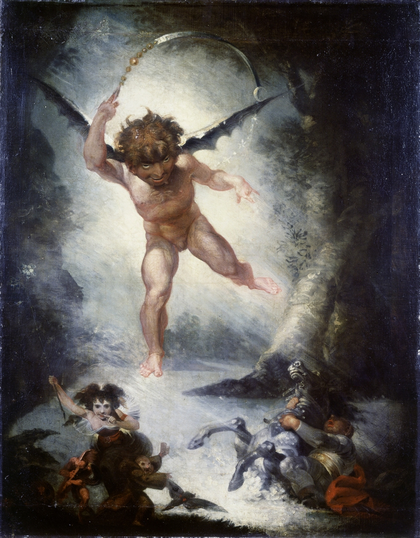 Robin Goodfellow-Puck, Öl auf Leinwand, 106 x 82 cm, Museum zu Allerheiligen, Schaffhausen